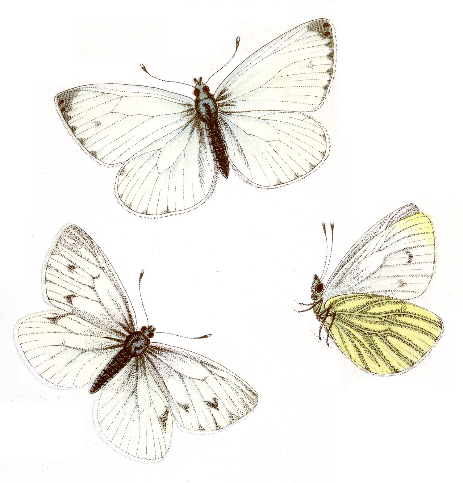 Green-veined White (Pieris napi)